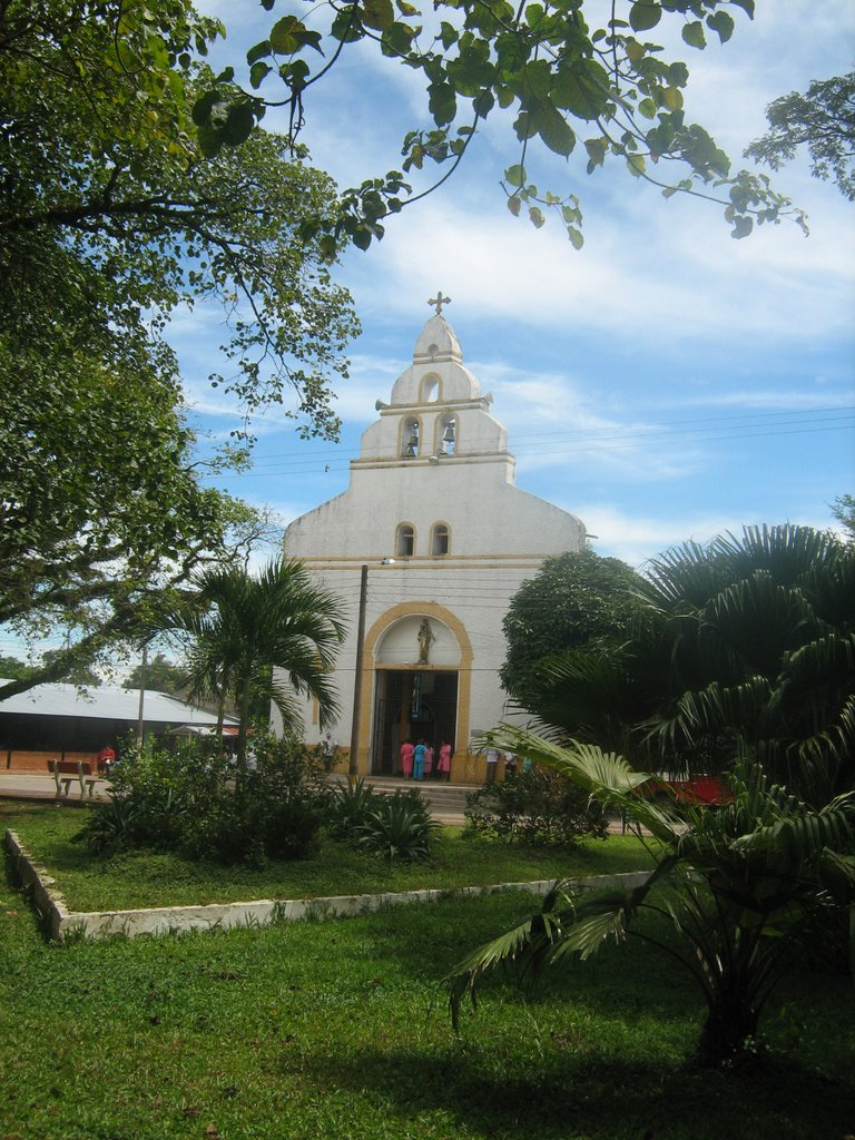 Iglesia Nuestra Señora de La Candelaria en el municipio de Medina